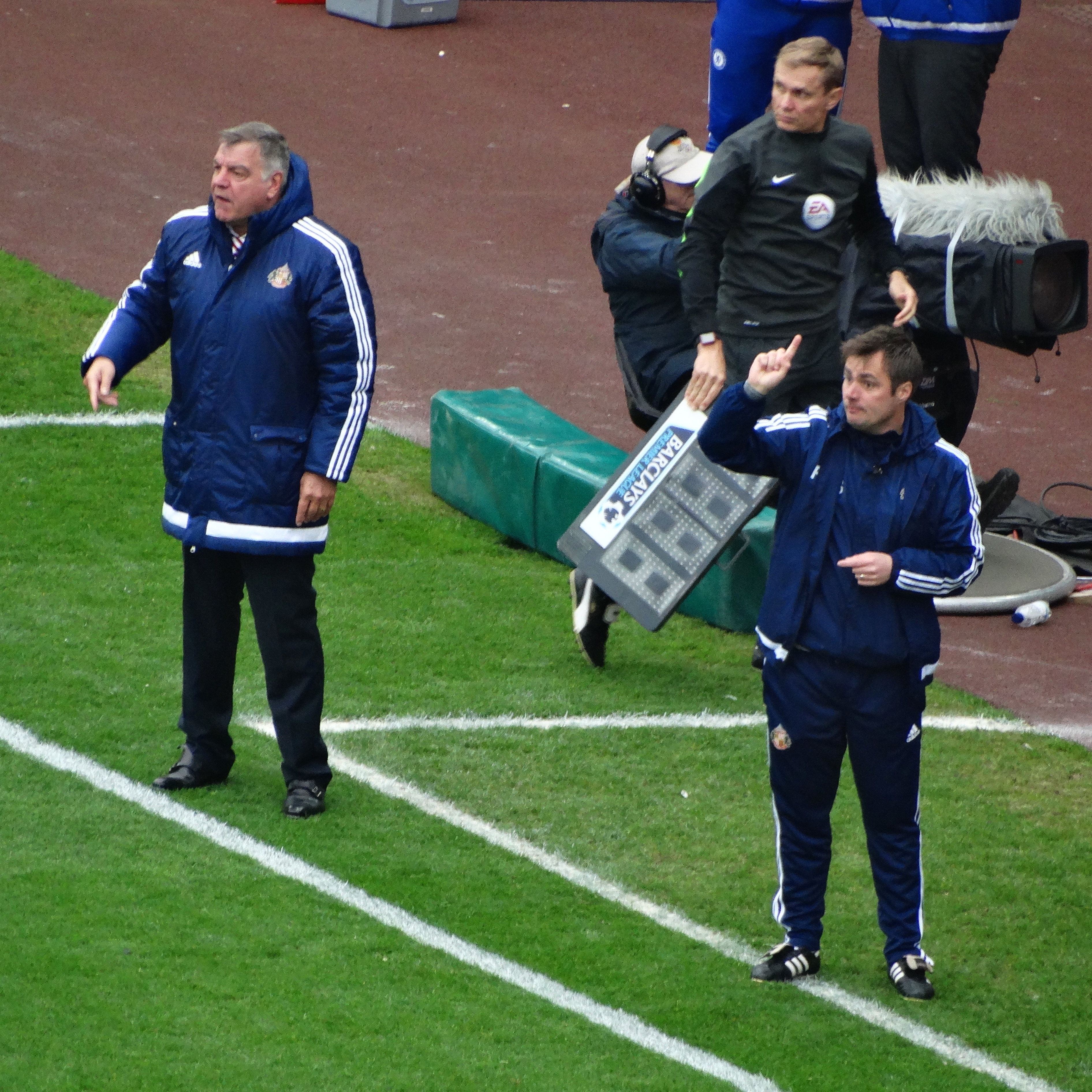 Sunderland 3 Chelsea2